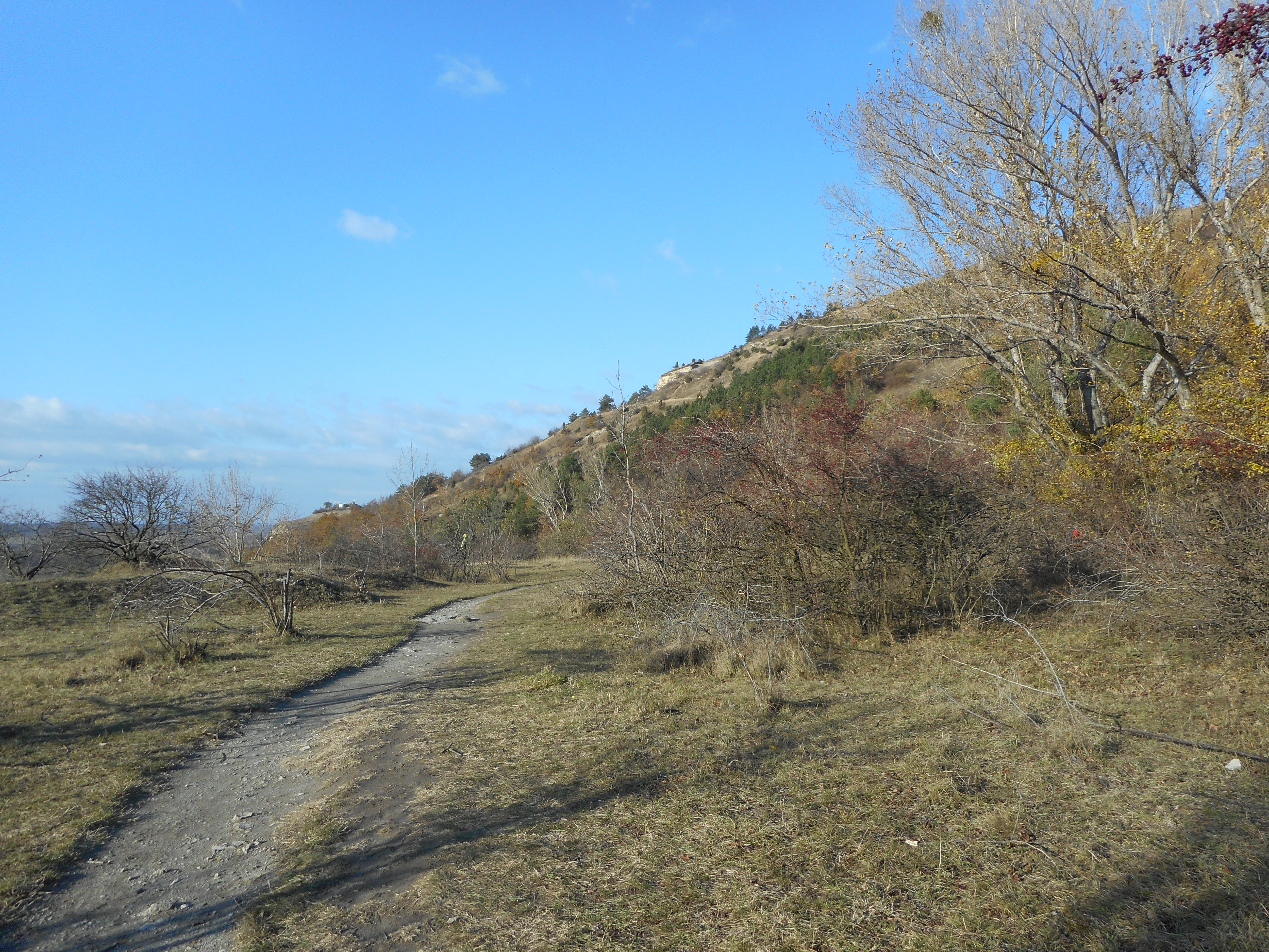 Devínska Kobyla hýri farbami aj na jeseň